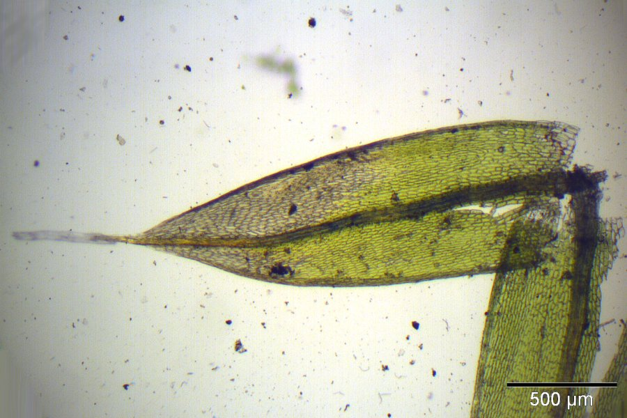 Rasen-Birnmoos (Bryum caespiticium), Blatt, Vergrößerung: 40x